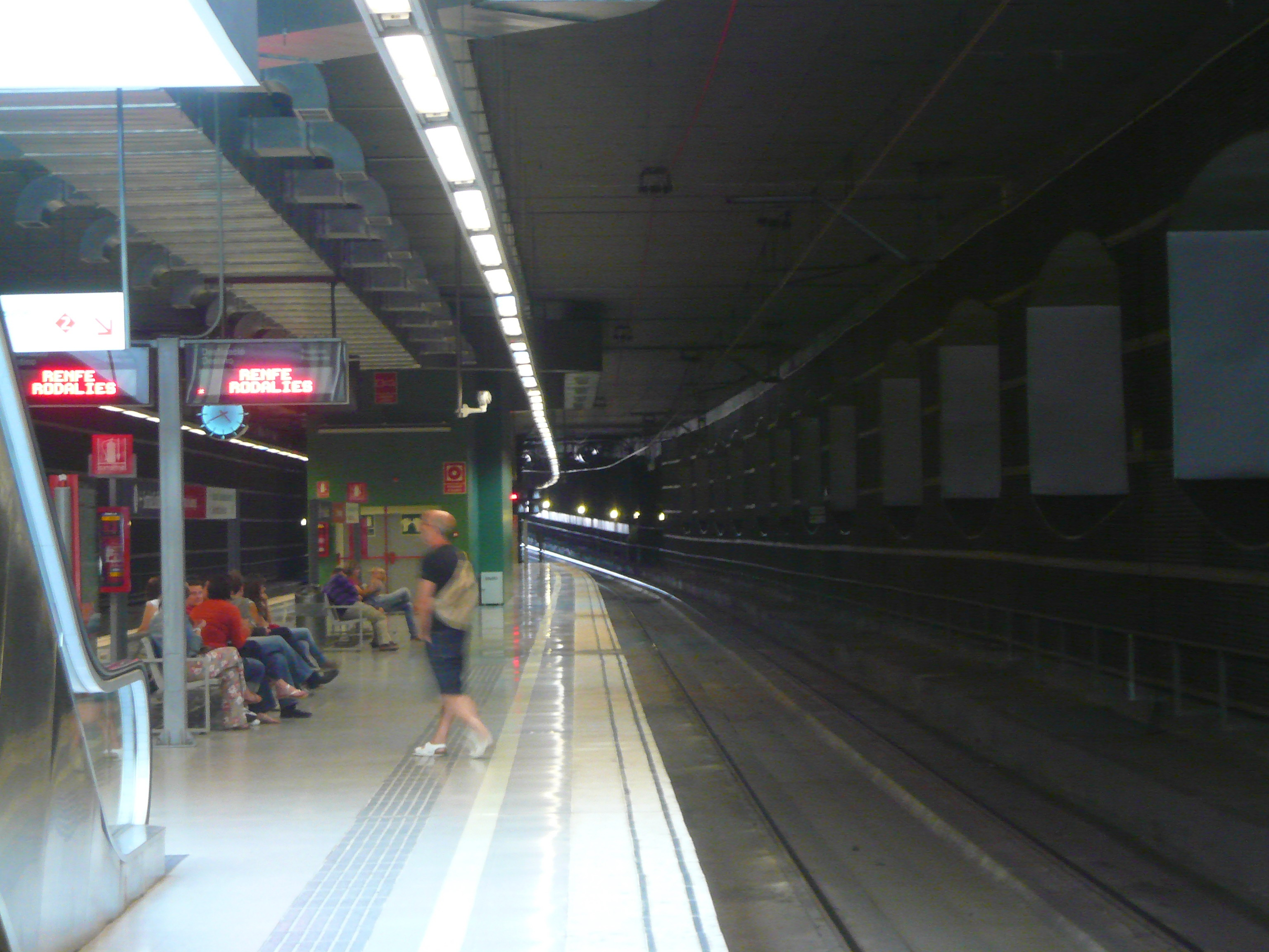 Interior de l'estació del Prat de Llobregat